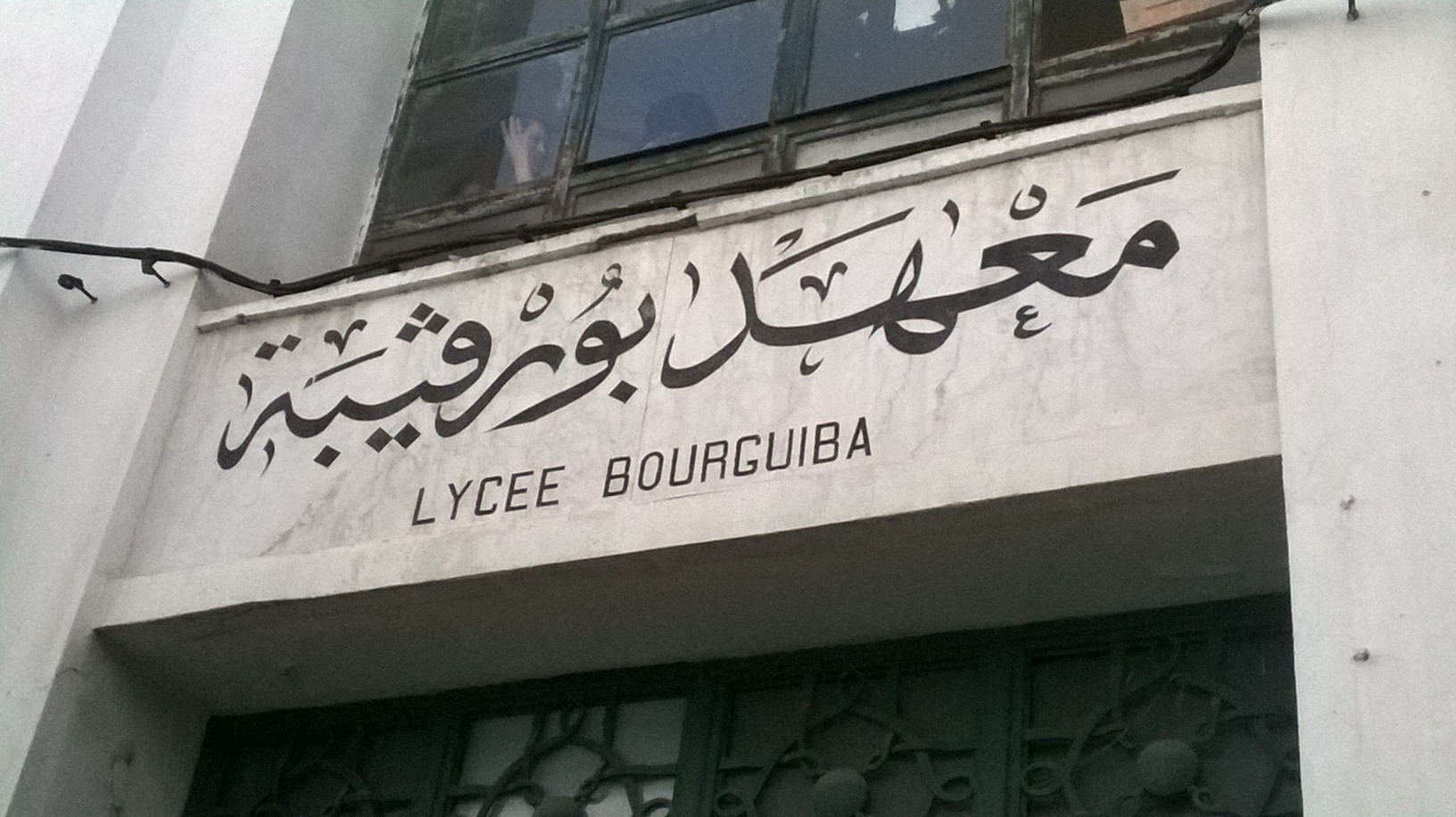 Tunis, Tunisie تونس العاصمة، تونس